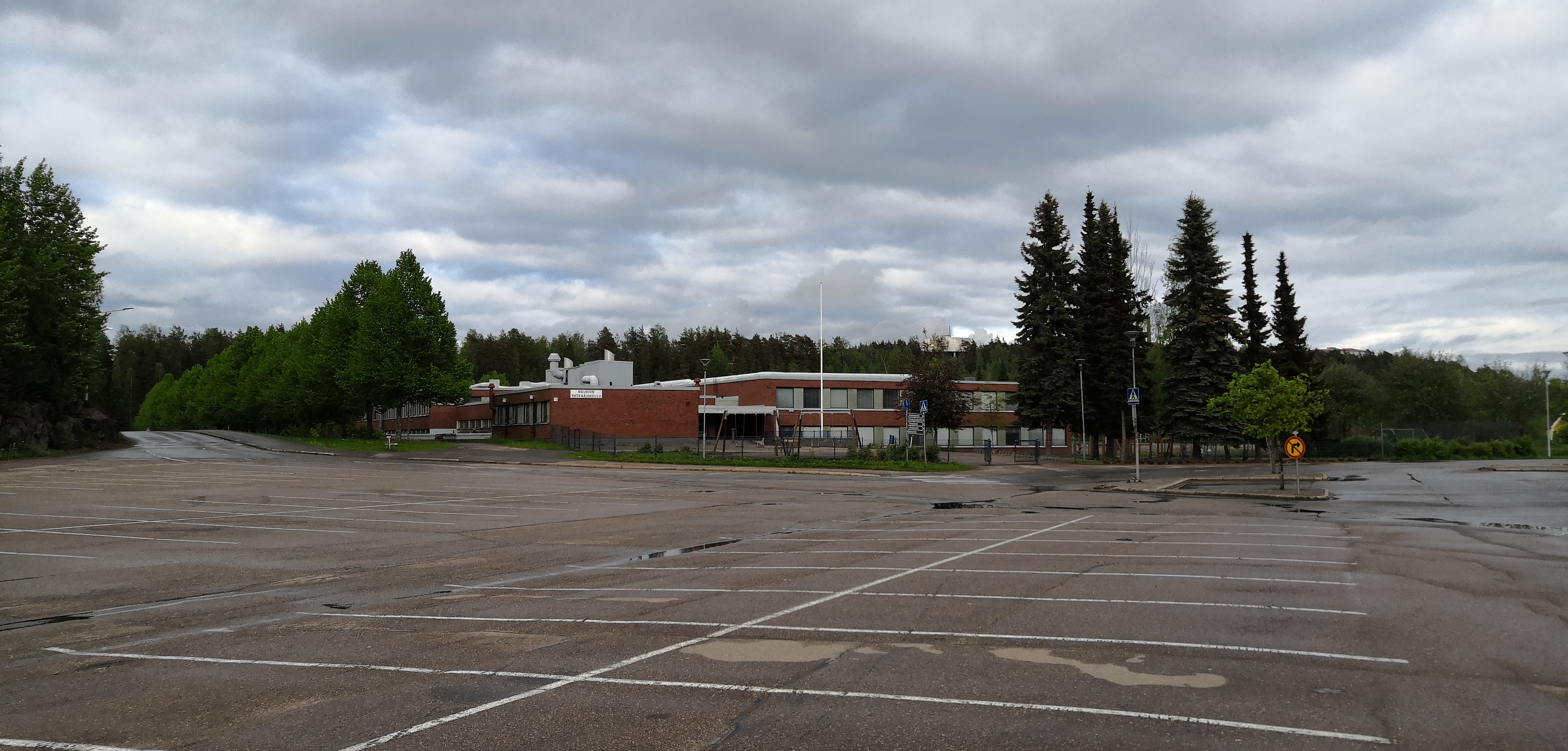 Naukion yhtenäiskoulu